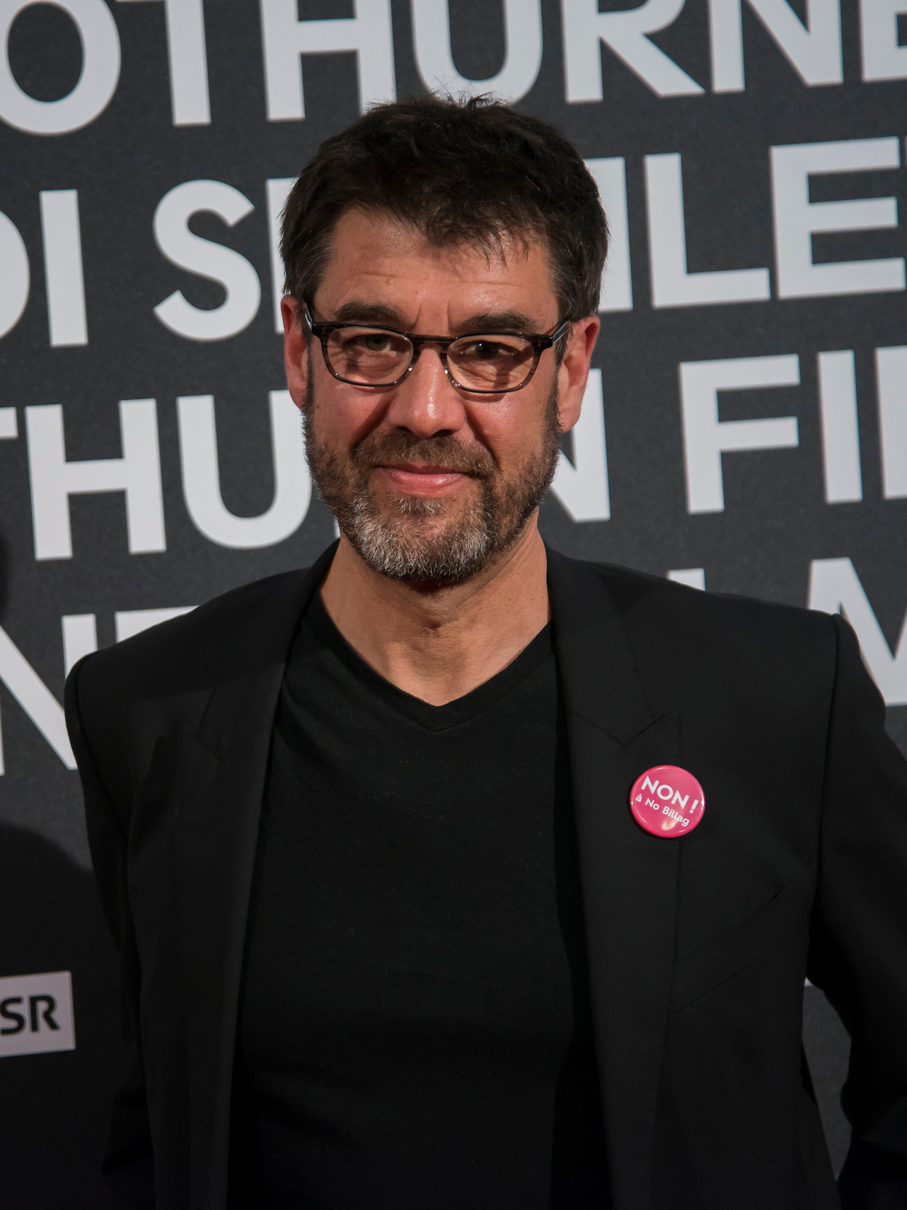 Fernand Melgar à la première mondiale de son film À l'école des Philosophes aux 53e Journées Cinématographique de Soleure